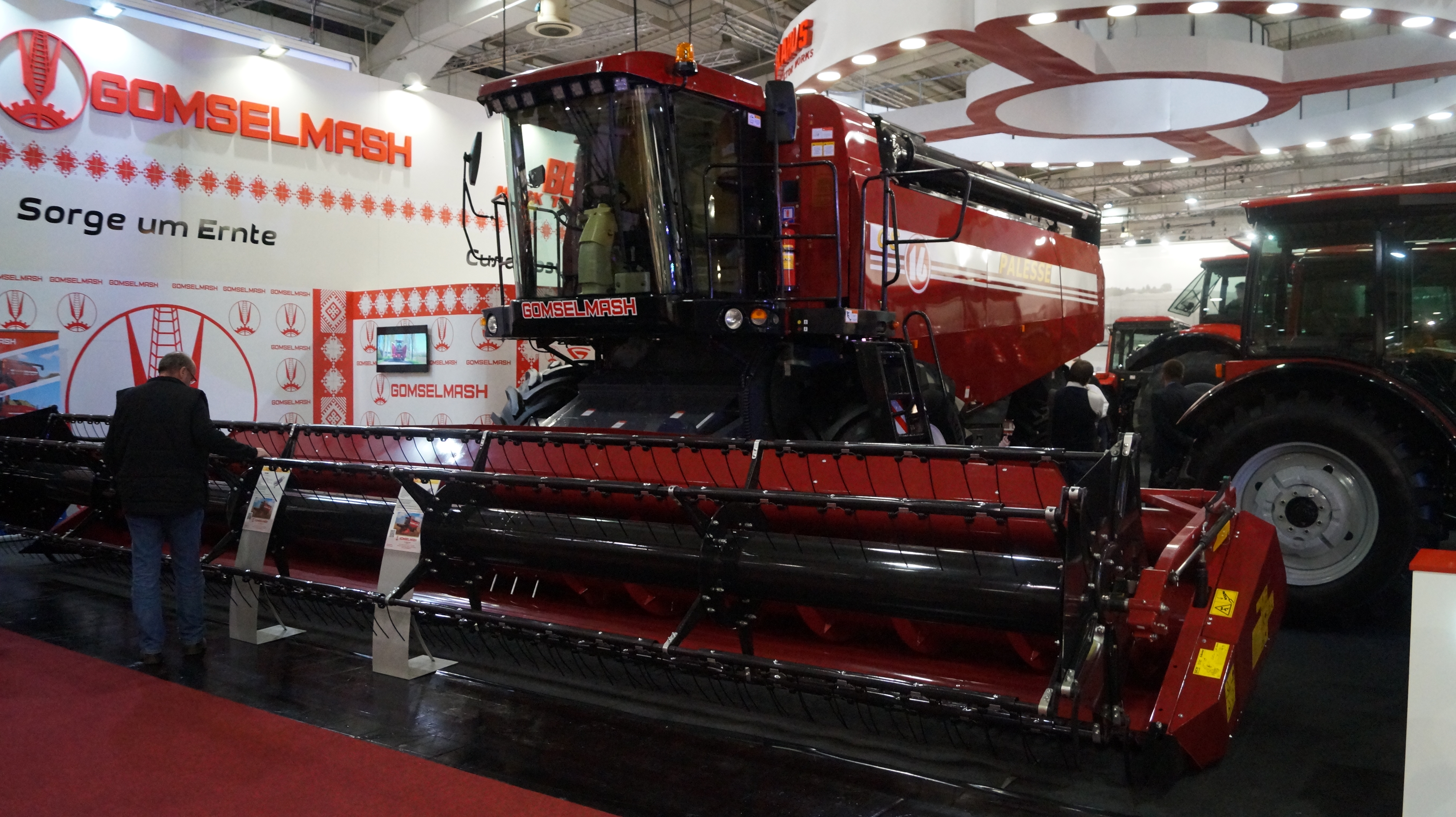 Front- und Seitenansicht eines Gomselmash Palesse GS 16, ausgestellt auf der Agritechnica 2017.